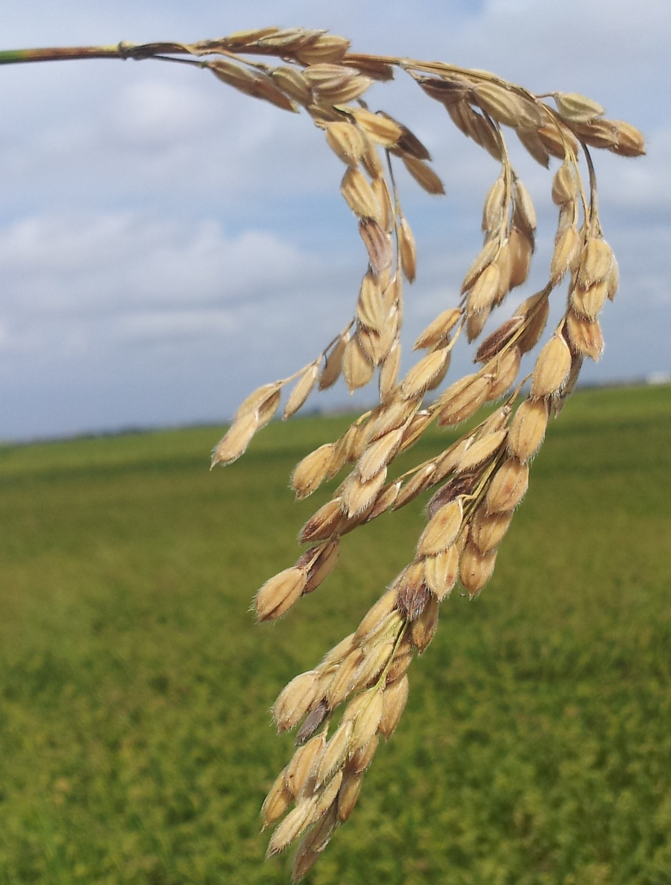 J. Sendra amb pyricularia.